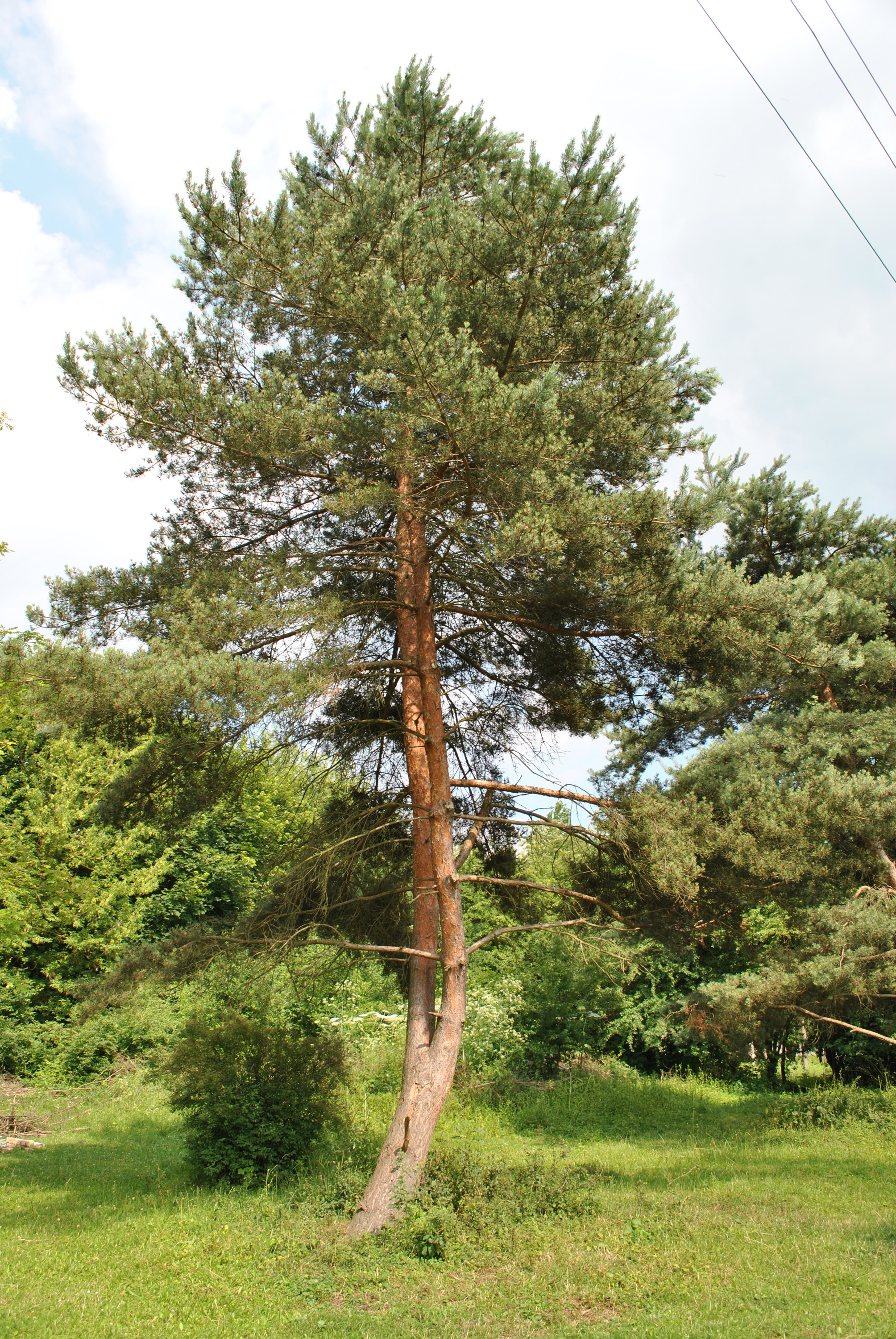 Сосна в «Настасівському дендропарку», с. Настасів Тернопільського району Тернопільської області.